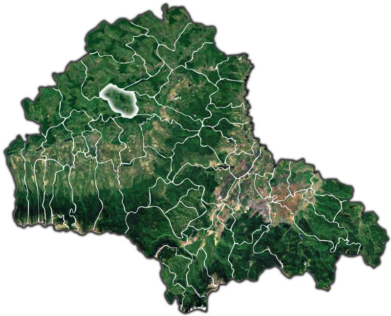 Ticus jud Brasov